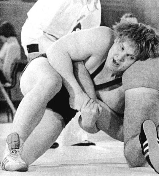 Roland Gehrke, Julius Strnisko ADN-ZB Liebers-12.8.82-zin Kanada: 21. Weltmeisterschaften der Freistilringer in Edmonton Schwergewichts-Titelverteidiger Roland Gehrke (DDR-Archivfoto) ist nach dem ersten Tag der Titelkämpfe noch ohne Niederlage. Der 28jährige Aktive von der SG Dynamo Luckenwalde hatte gegen Julius Strnisko (CSSR) harten Widerstand zu brechen, bevor sein 4:2 Punktsieg feststand und trifft nun in der dritten Runde auf den Ungarn Fezetka.